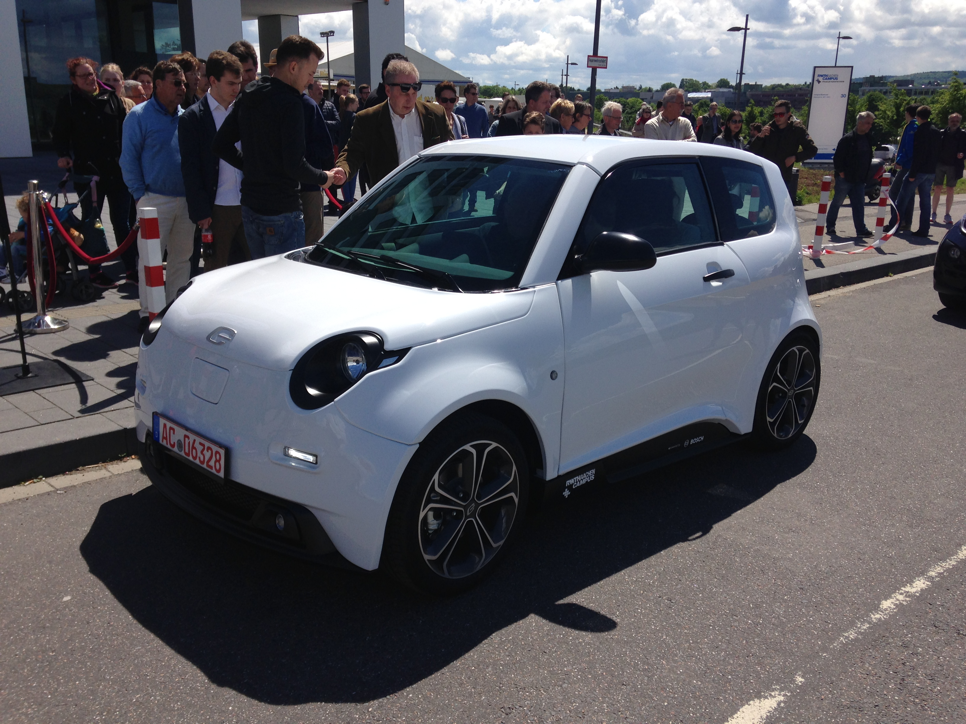 Prototyp des e.GO Life beim e.Mobility Day 2017 in Aachen.